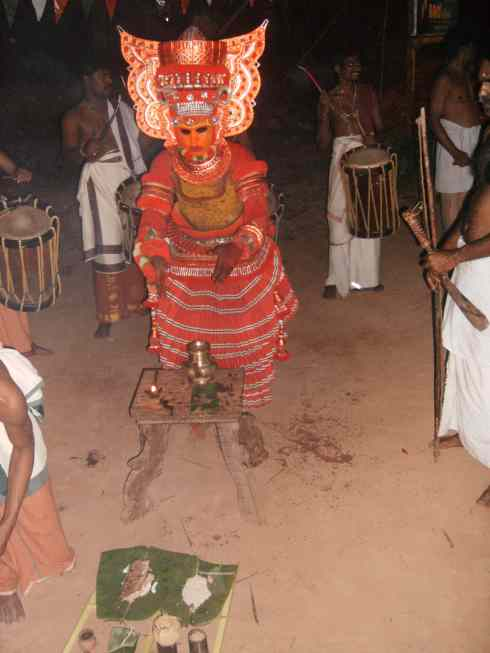 വയനാട്ടു കുലവൻ വെള്ളാട്ടം കീഴറ കൂലോം ഭഗവതി ക്ഷേത്രത്തിൽ കെട്ടിയാടിച്ചപ്പോൾ